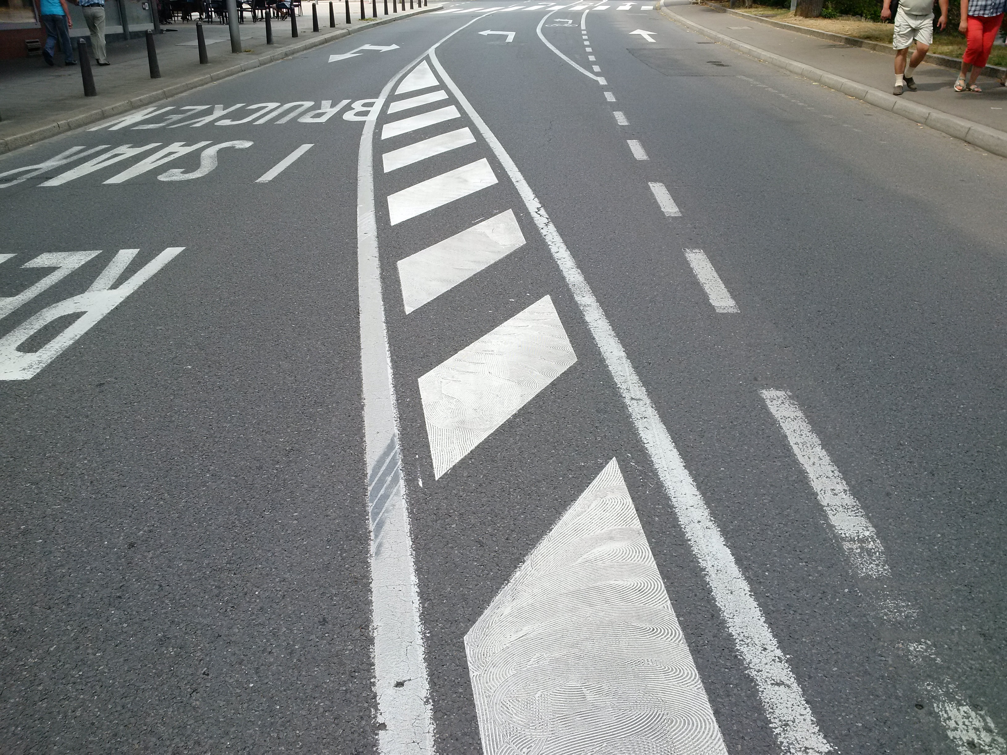 Signalisation horizontale du Code de la route luxembourgeois: surface de lignes obliques parallèles délimitées par une ligne continue; elle indique qu’il est interdit de circuler sur cette partie de la chaussée, d’y stationner ou de s’y arrêter.